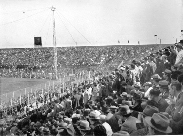 Tribuna en un partido de fútbol.